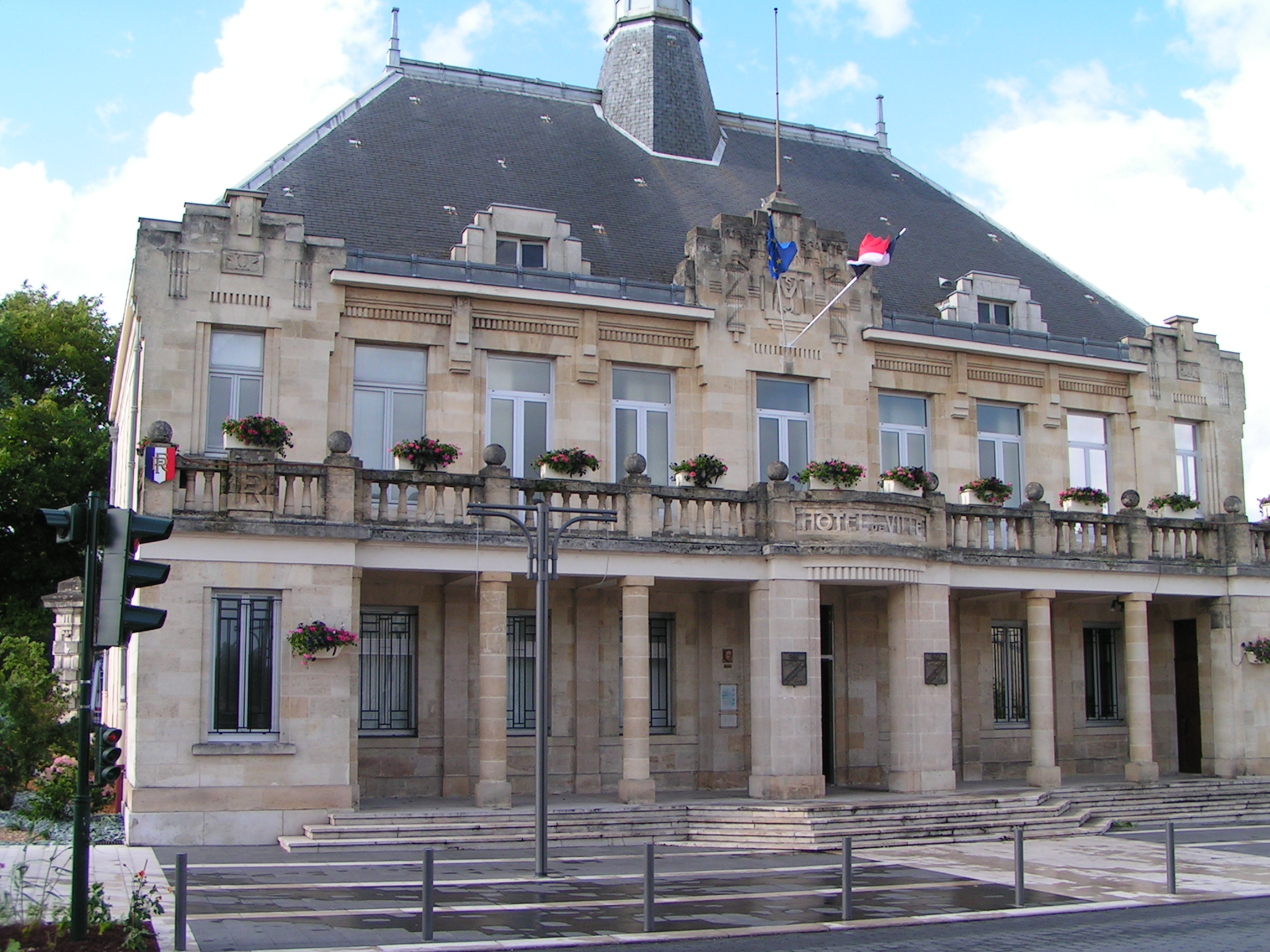 Mairie de Saint-Médard-en-Jalles